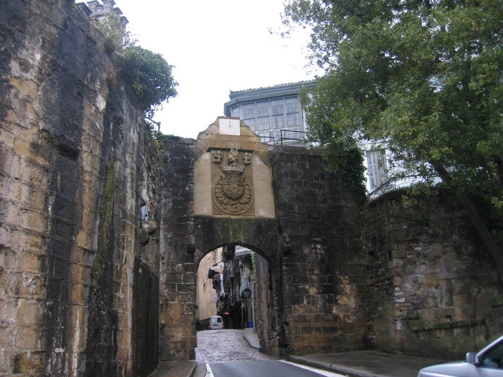 Fuenterrabía (Guipúzcoa)-Puerta de Santa María